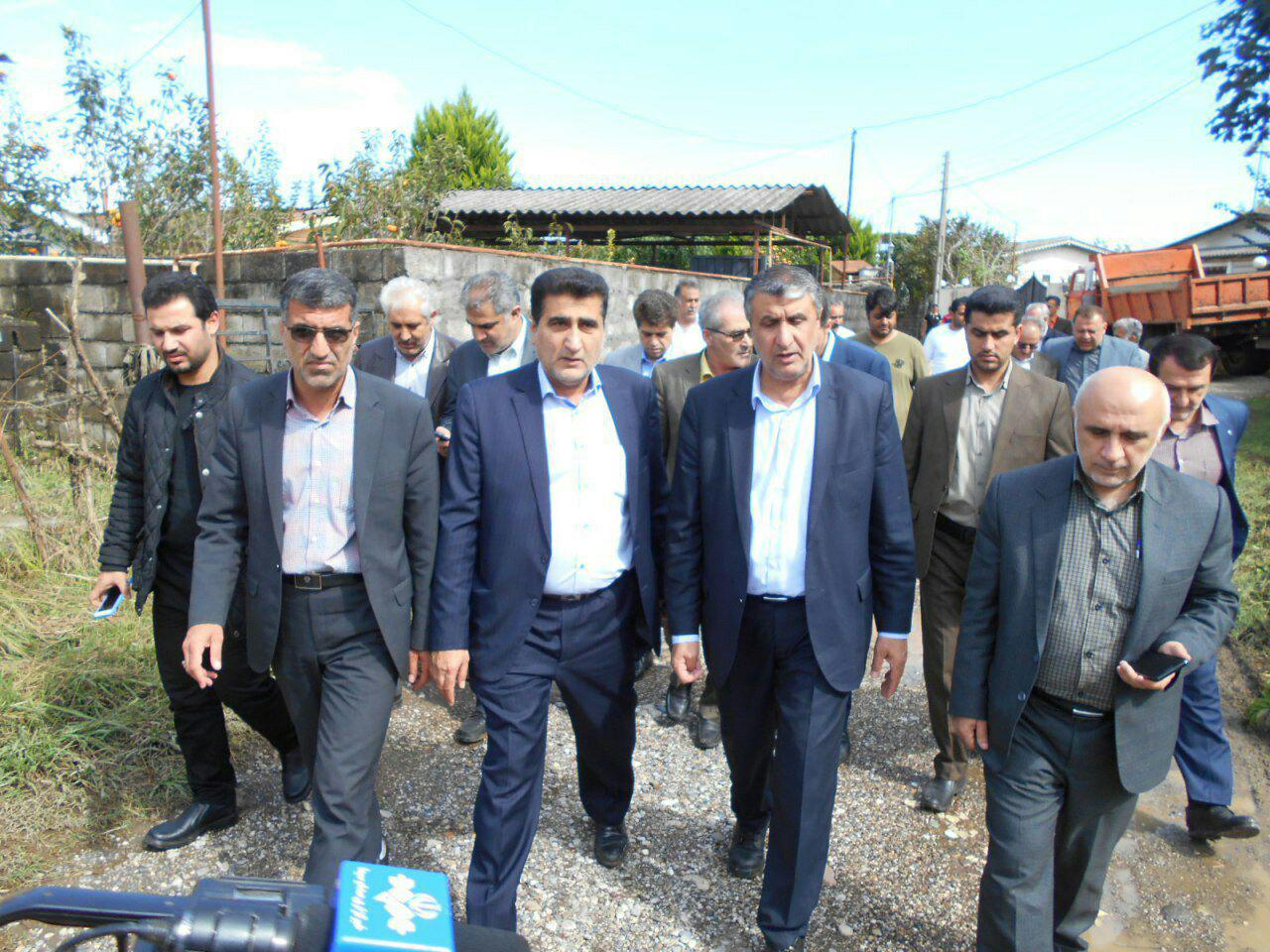 بازدید میدانی دکتر موسی پسندی شهردار عباس آباد به همراه وزیر راه مهندس اسلامی در بحران سیل شمال کشور